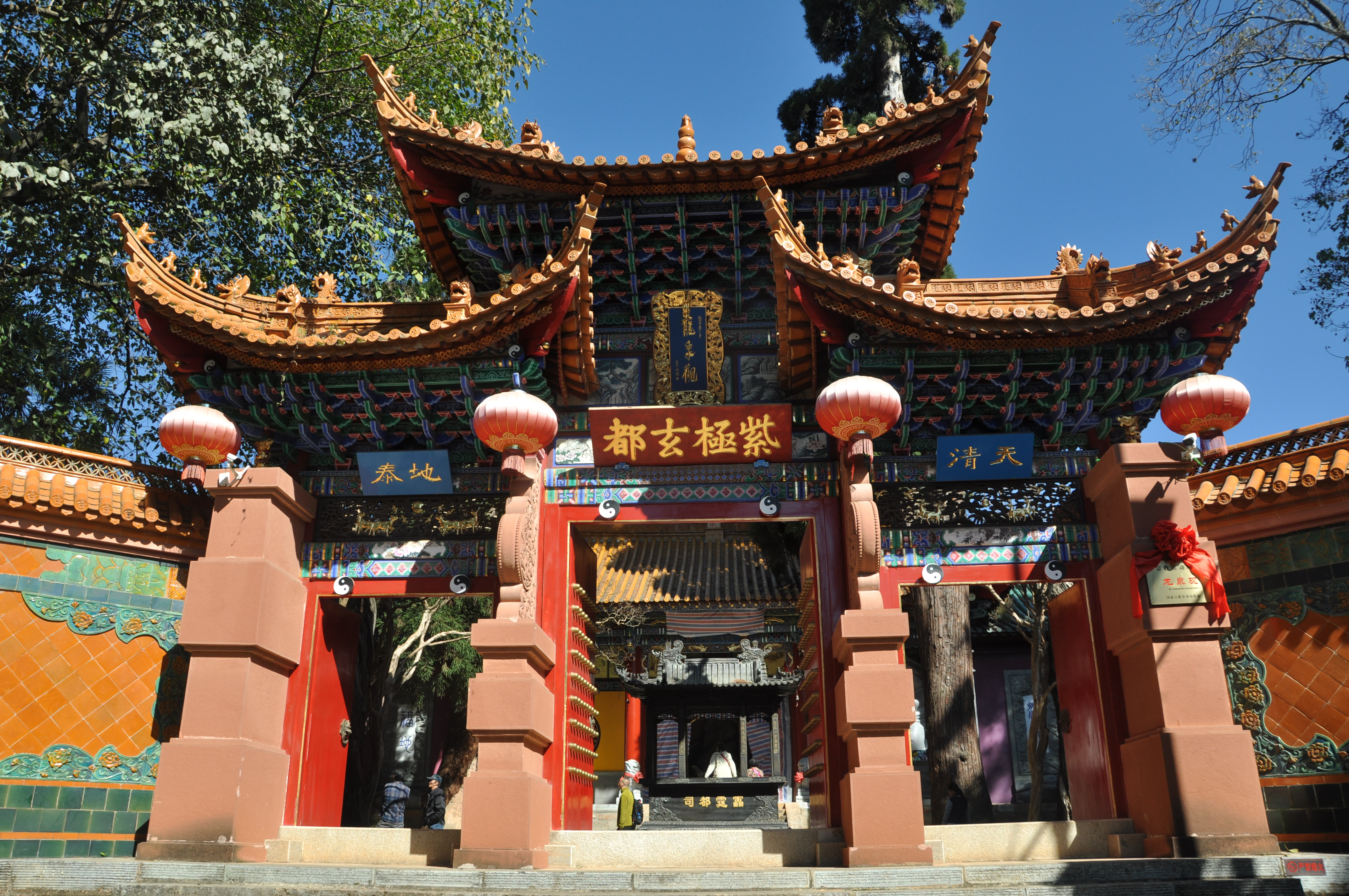 昆明黑龙潭公园内的黑龙观。